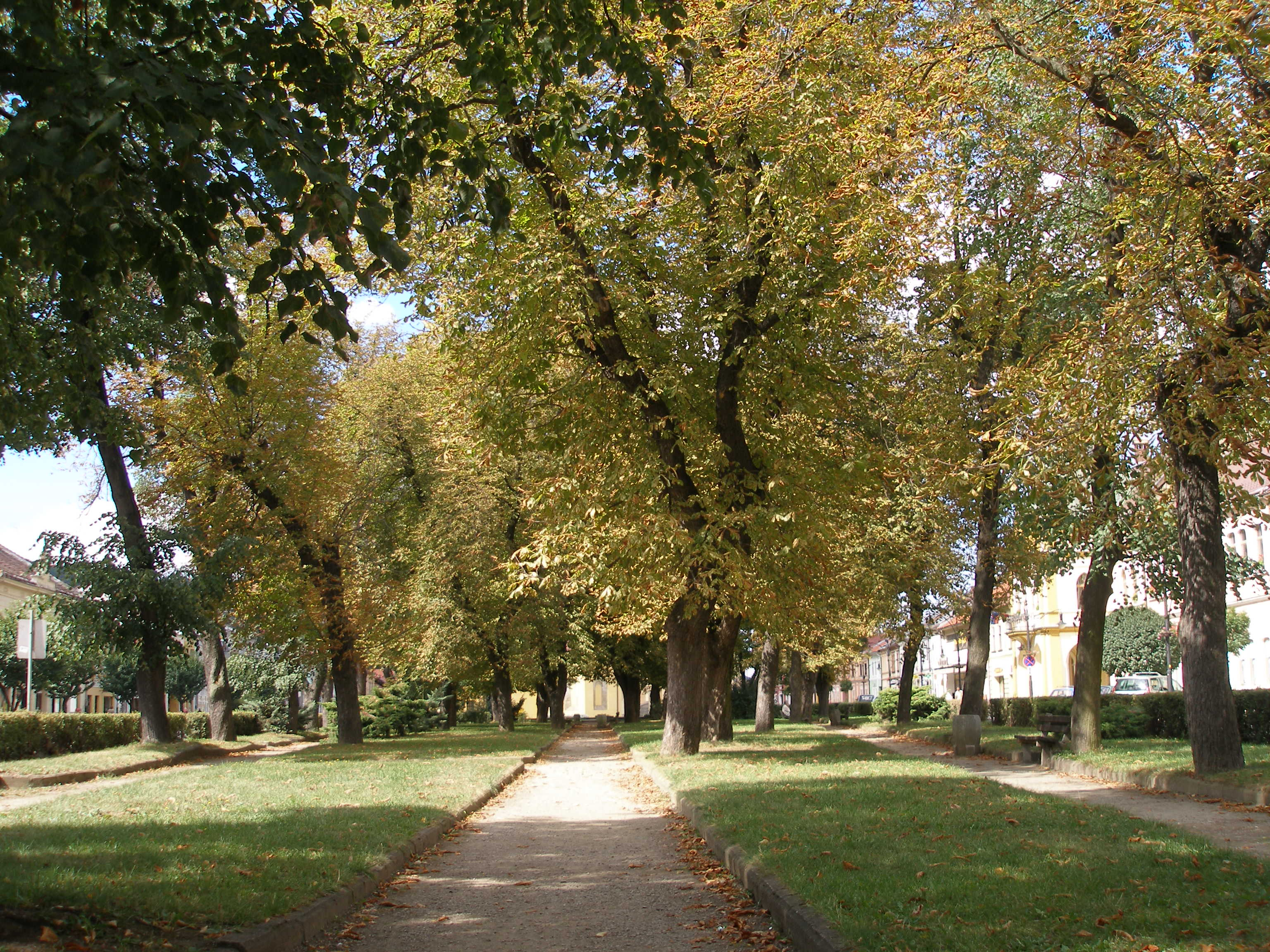 Sabinov starobylé bývalé slobodné kráľovské mesto na Slovensku. Dnes okresné mesto v regióne Šariš.